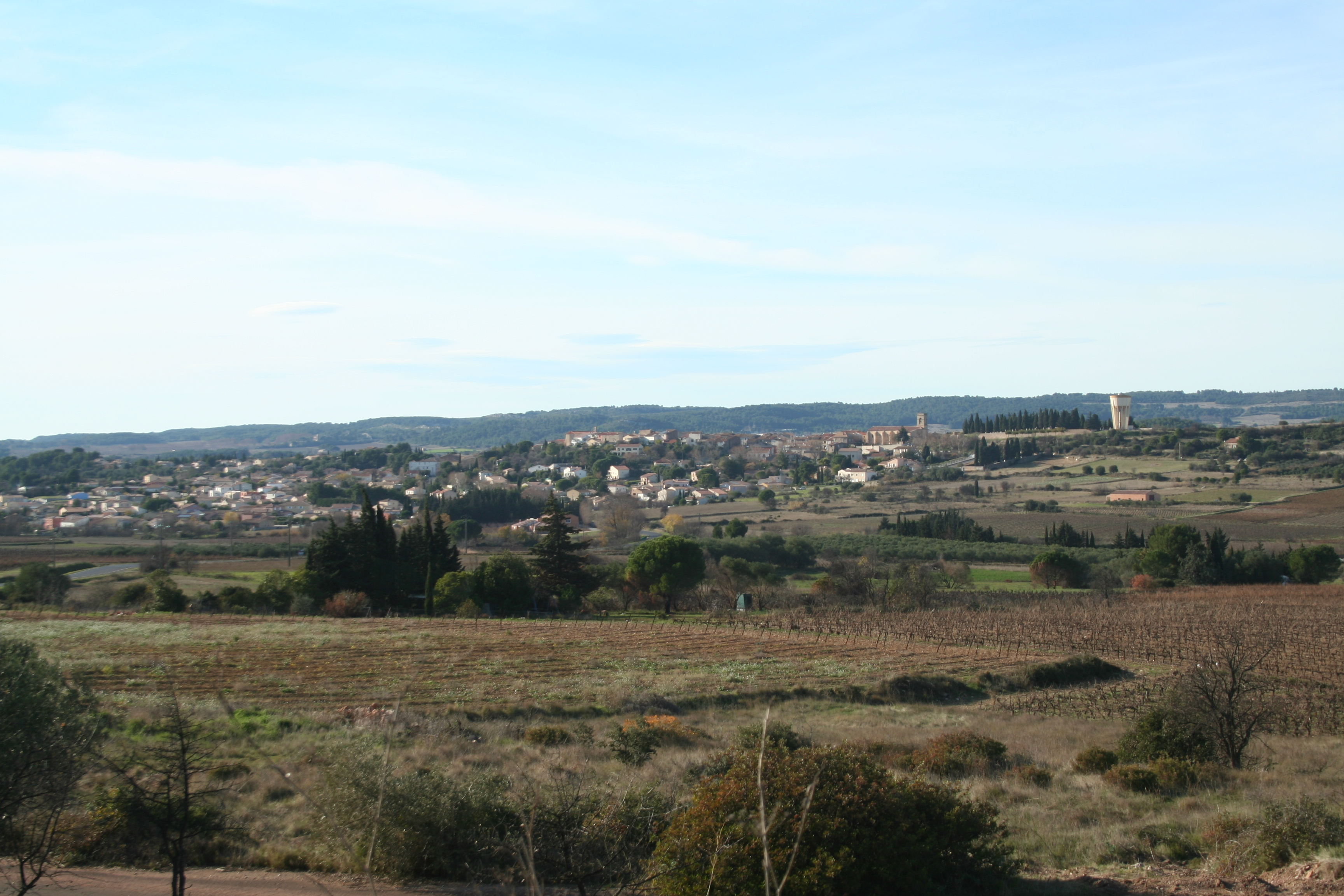 Villeveyrac (Hérault) - vue générale.